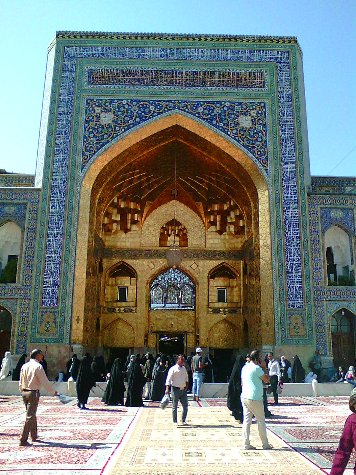 نمای با شکوه ایوان طلایی مشهد مقدس شاهکار هنر ایرانی-اسلامی